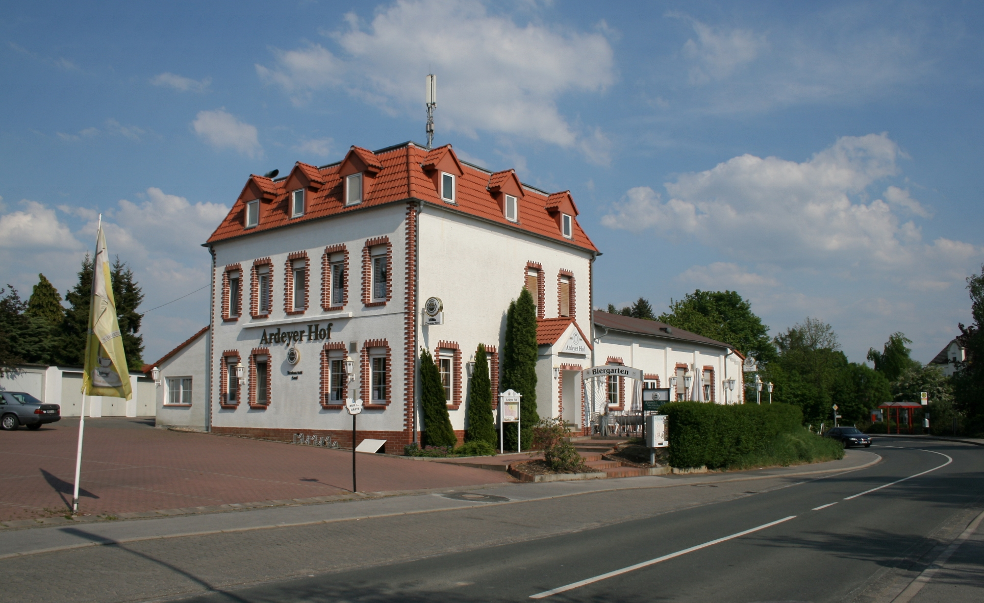 Haus Ardey in Fröndenberg-Ardey.